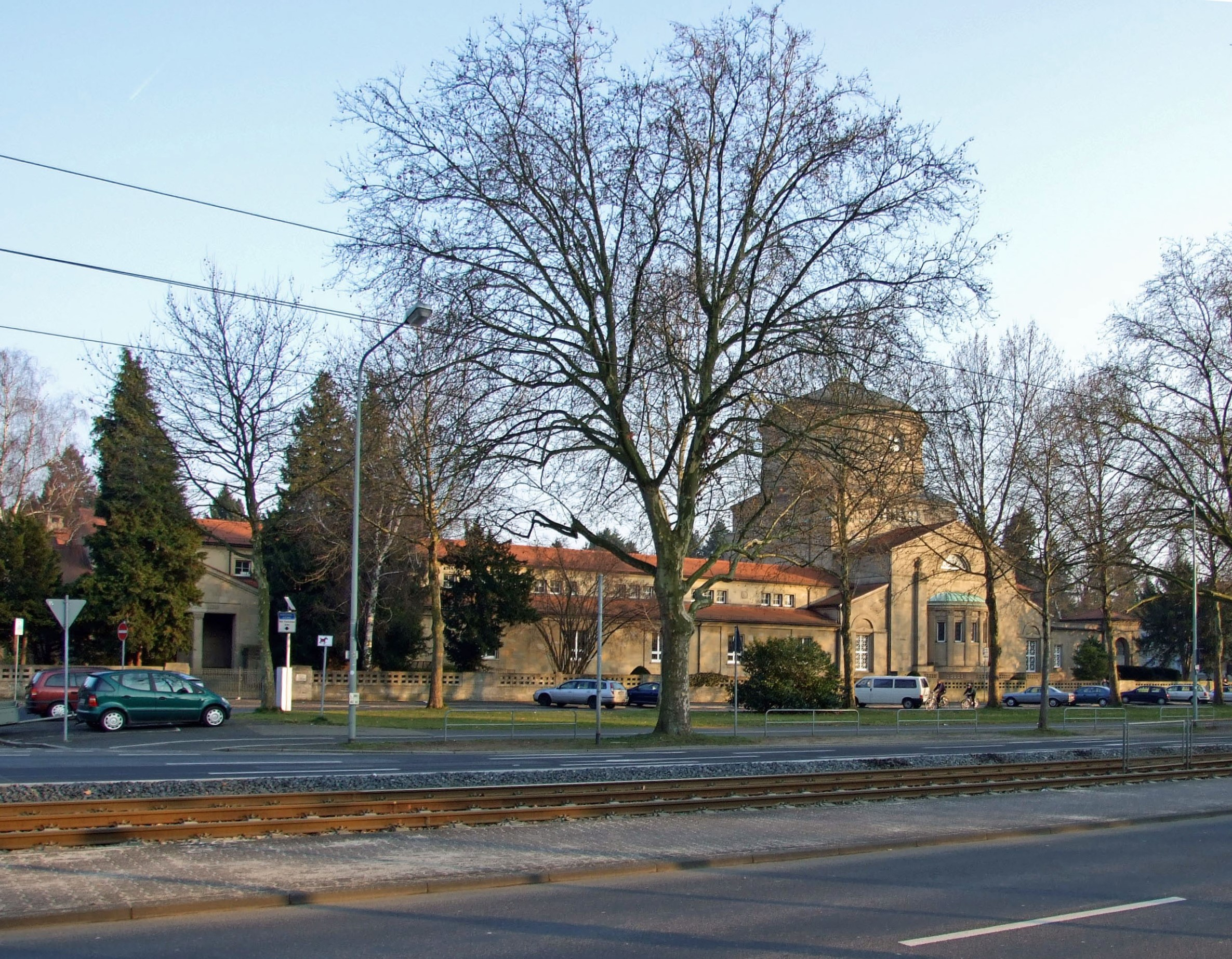 Neues Portal des Frankfurter Hauptfriedhofes an der Eckenheimer Landstrasse